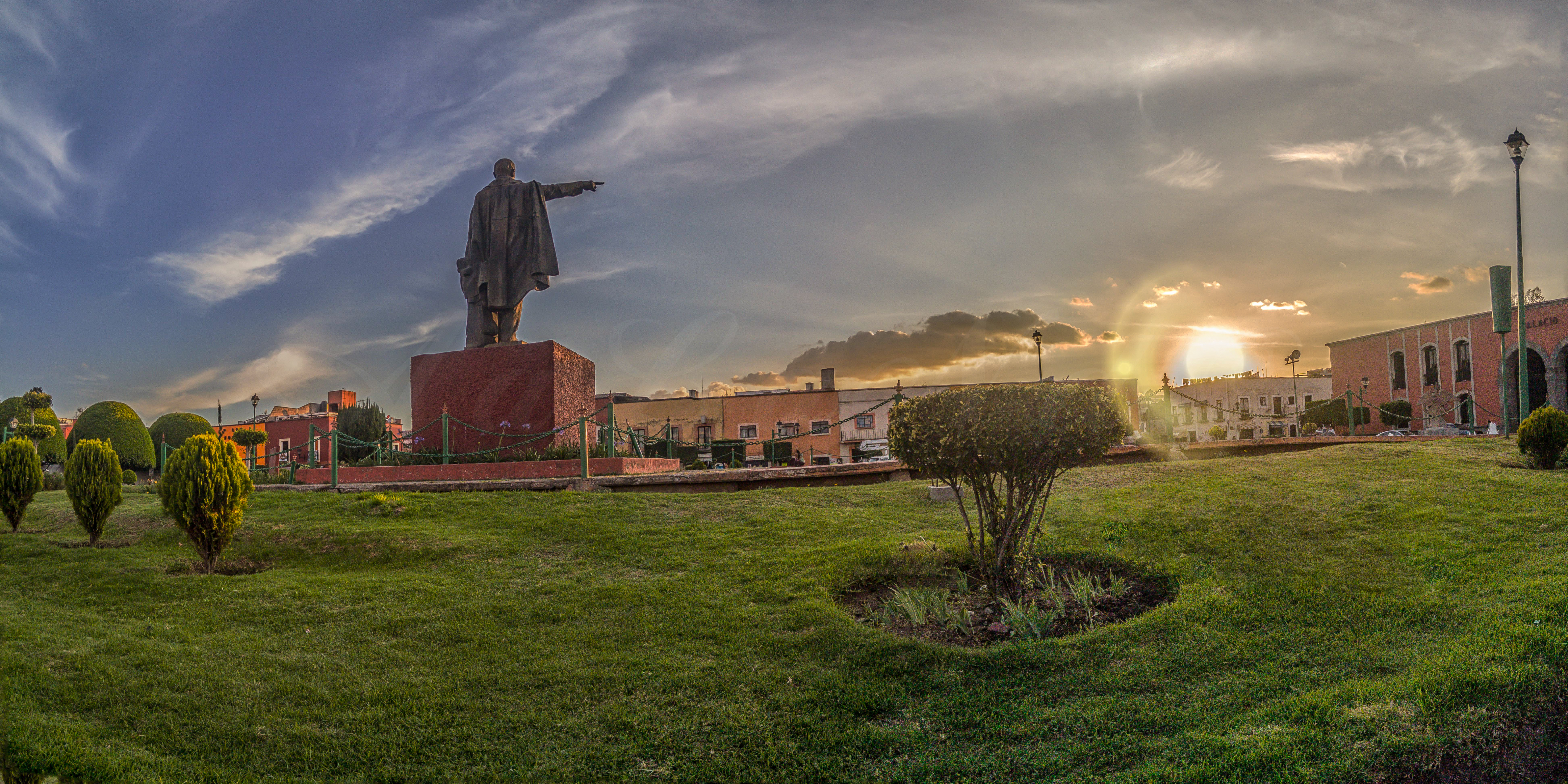 Plaza Juarez - Tlaxcala